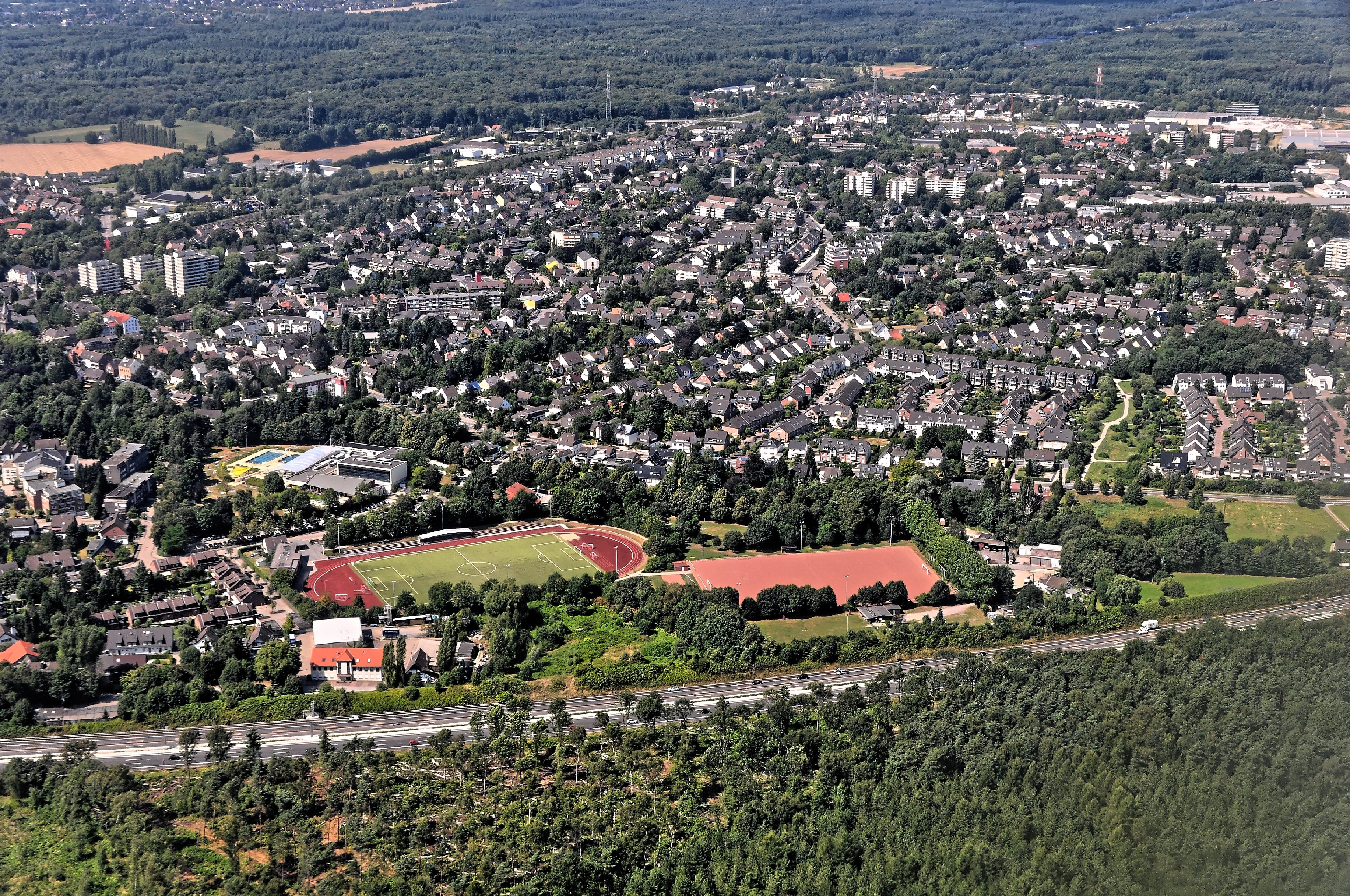 Bilder vom Flug -Rom-Düsseldorf-Hamburg 2013 Dieses Foto entstand in Zusammenarbeit mit Stadtbesichtigungen.de Die Seiten Stadtbesichtigungen.de, der dazugehörige Reise Blog sowie die Facebookseite: Stadtbesichtigungen Rom dürfen dieses Bild für Ihre Veröffentlichungen ohne den Hinweis auf Wikipedia, Commons bzw der Lizenz verwenden. Die Verantwortlichen habe von mir (Ra Boe) die Originaldaten zur freien Verfügung übermittelt bekommen.